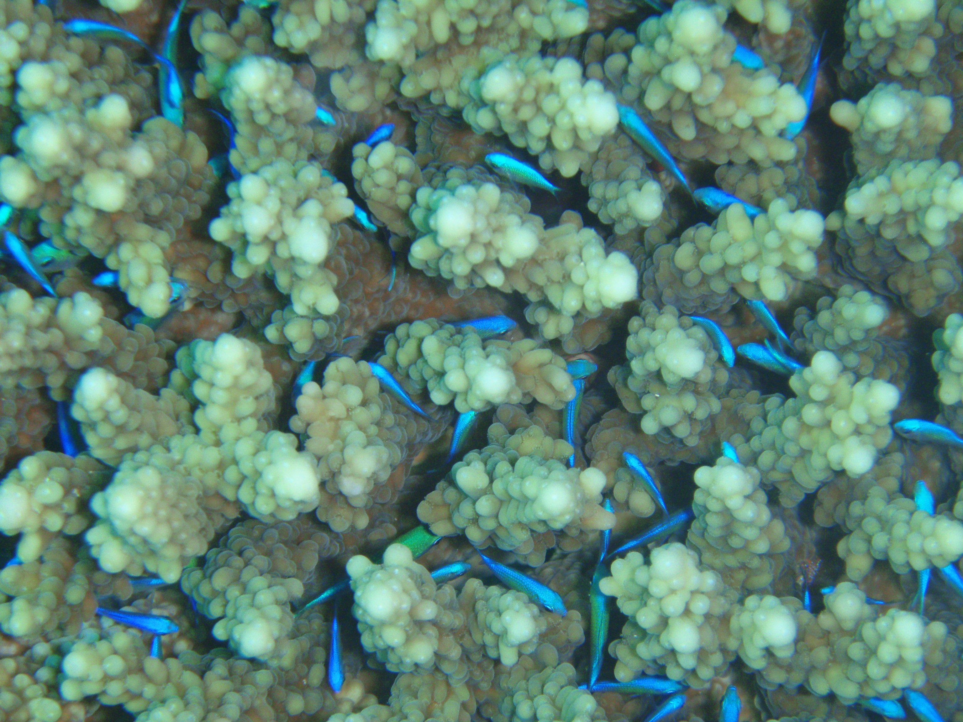 Chromis viridis; juvenile Tiere in Koralle zurückgezogen